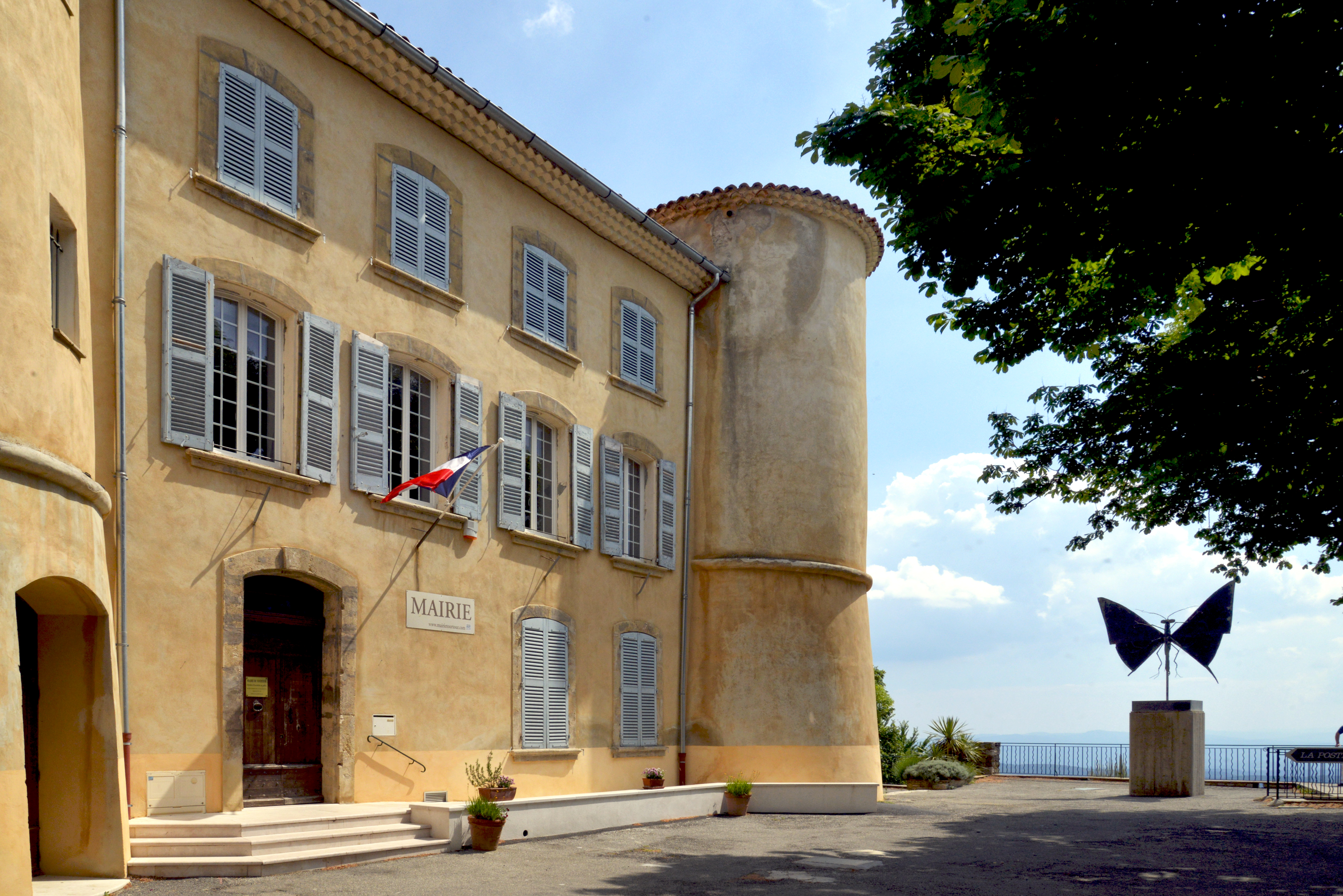 Tourtour, Var (Provence-Alpes-Côte d'Azur) - Le château communal abritant la mairie. Sur la droite, l'un des deux bronzes de Bernard Buffet offerts à la commune